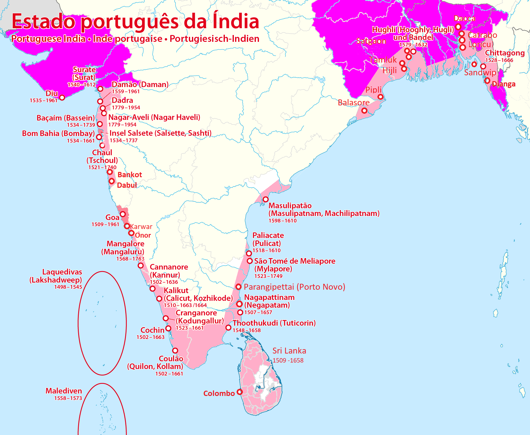 Allied and Portuguese settlements in India